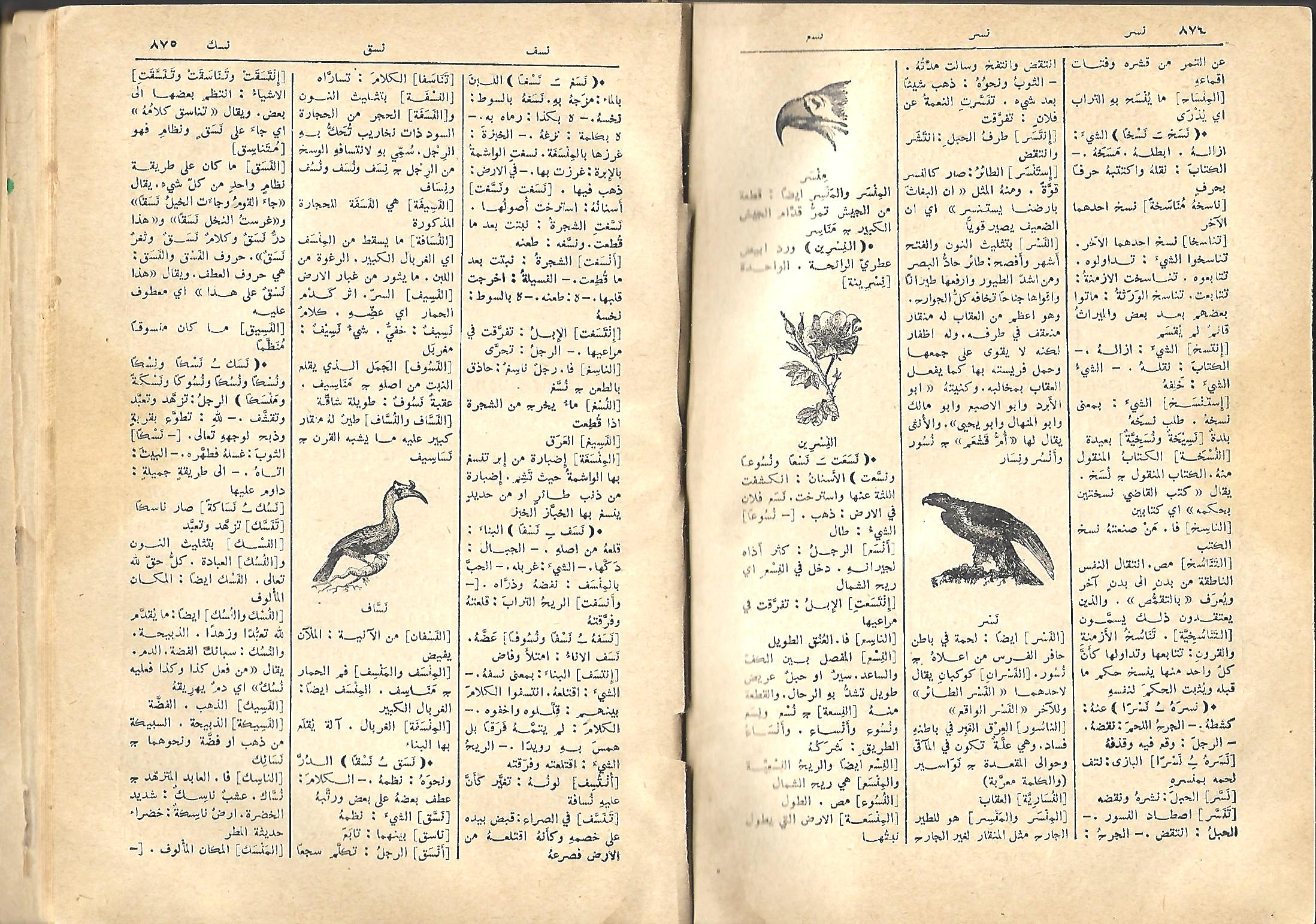 إحدى صفحات كتاب المنجد في طبعته السابعة - نيسان 1931 - وهو قاموس لغة عربية من تأليف الأب لويس معلوف اليسوعي، ويلاحظ فيه اضافة الرسومات للتوضيح